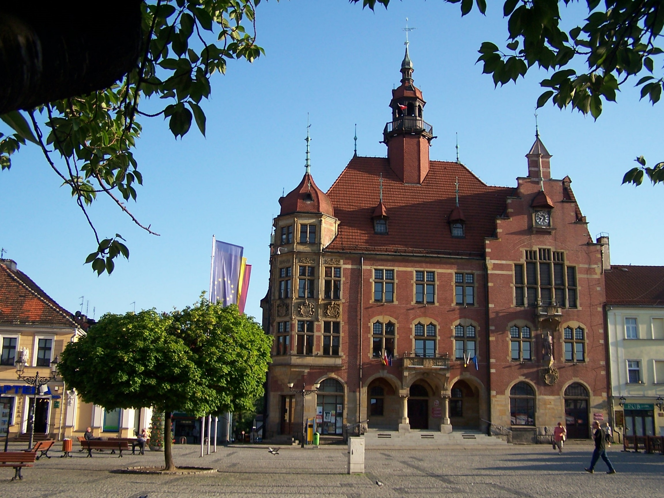 Ratusz